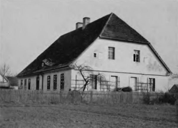 Die Schule in Lugnian um 1930